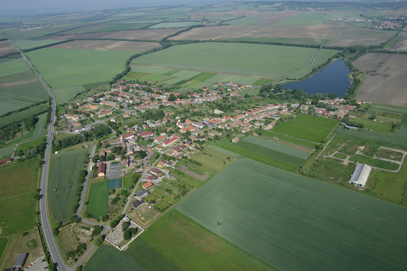 Letecký pohled na Branišovice (2019)